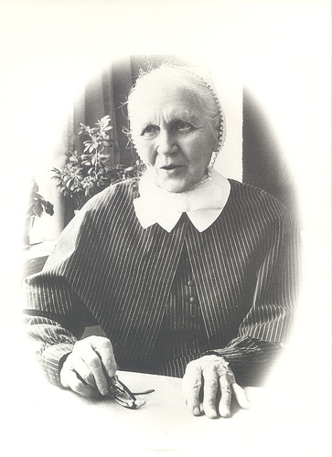 Valokuva sisar Aino Miettisestä (14. lokakuuta 1885 - 21. kesäkuuta 1981)